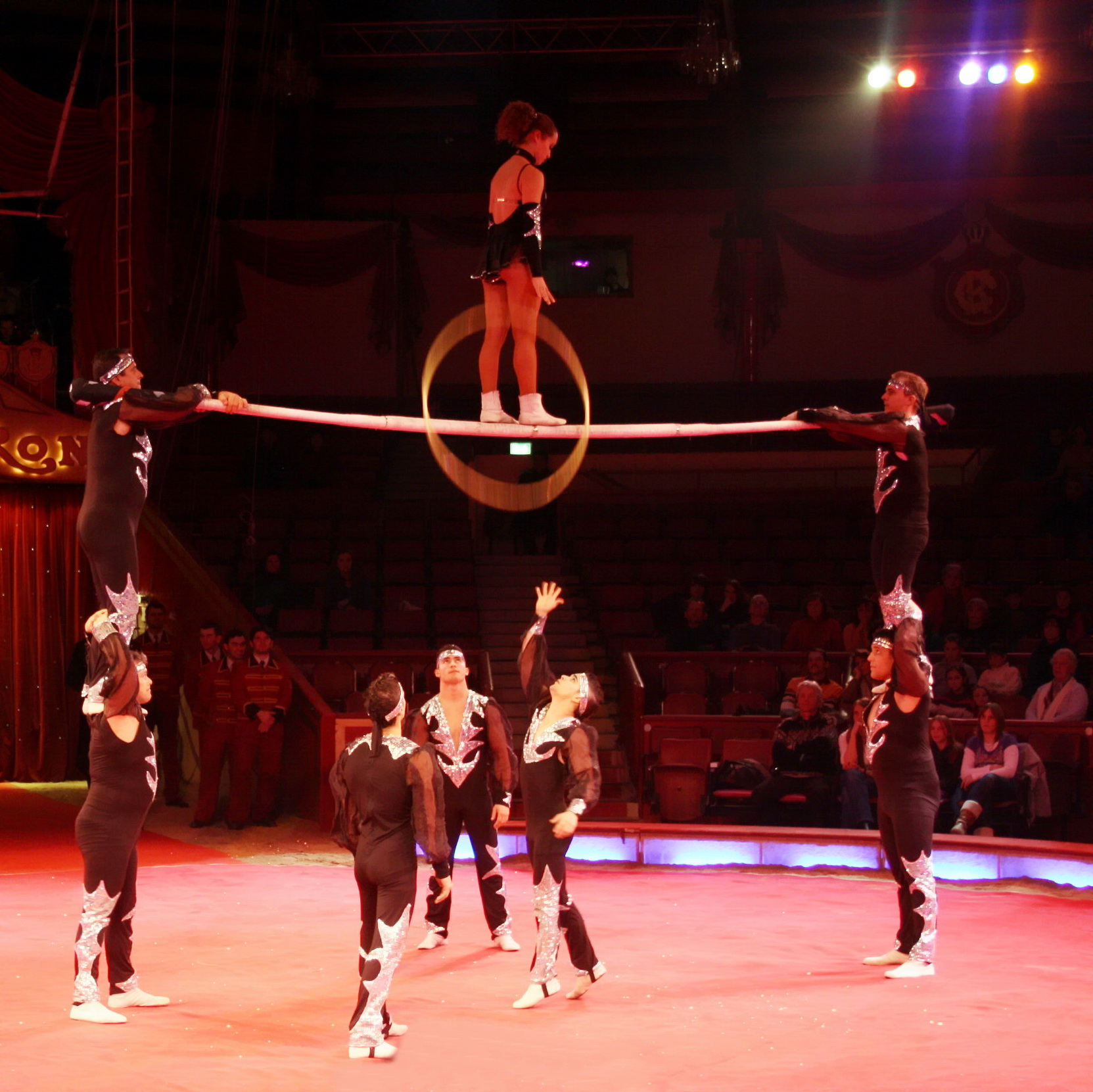 TRUPPE SCALA am Russischen Barren.